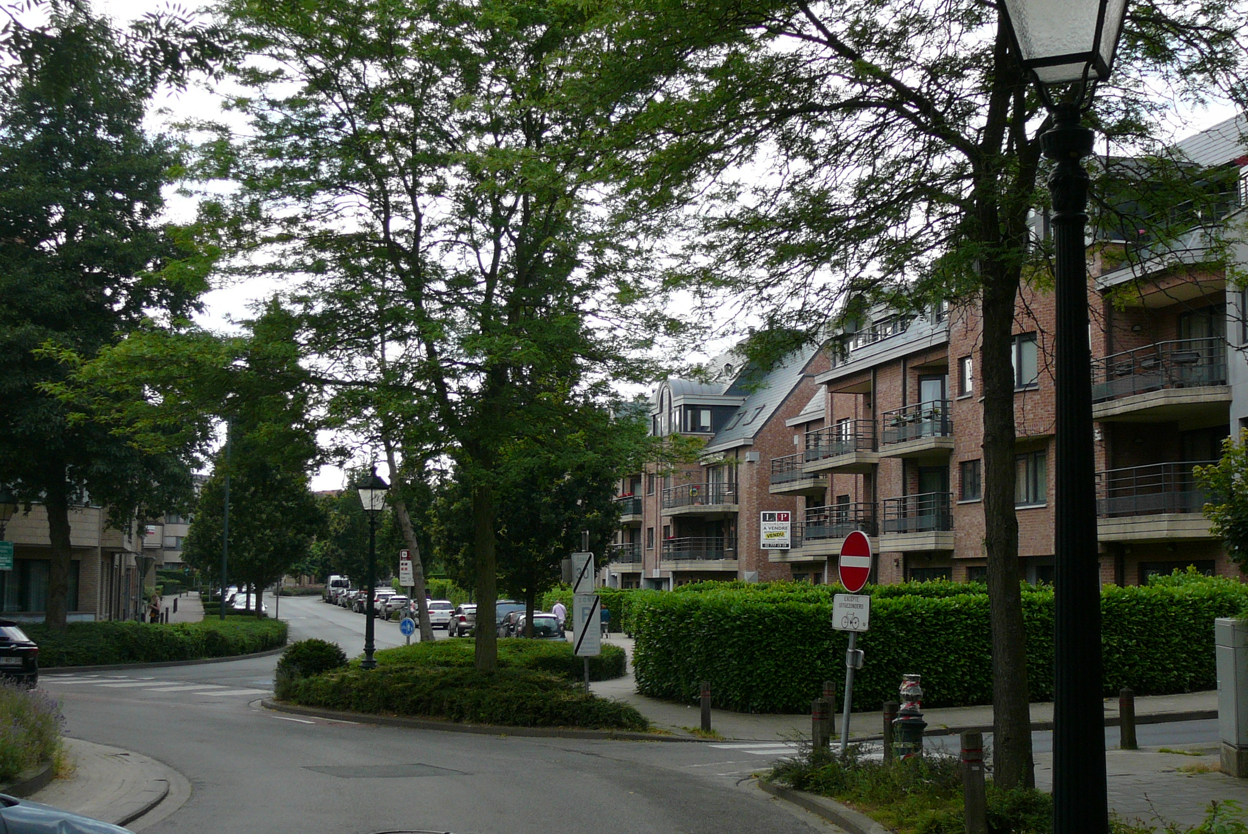 Val des Seigneurs à Woluwe-Saint-Pierre, en Région bruxelloise, Belgique, en juillet 2016